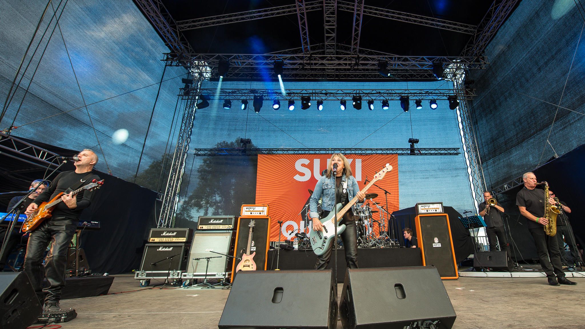 Brombachsee,Concertbüro Franken,Festival,Konzert,Lieder am See,Livekonzert,Livemusik,Musik,Susan Kay Quatro,Suzi Quatro